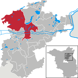 Schorfheide in Brandenburg (Country) - District Barnim